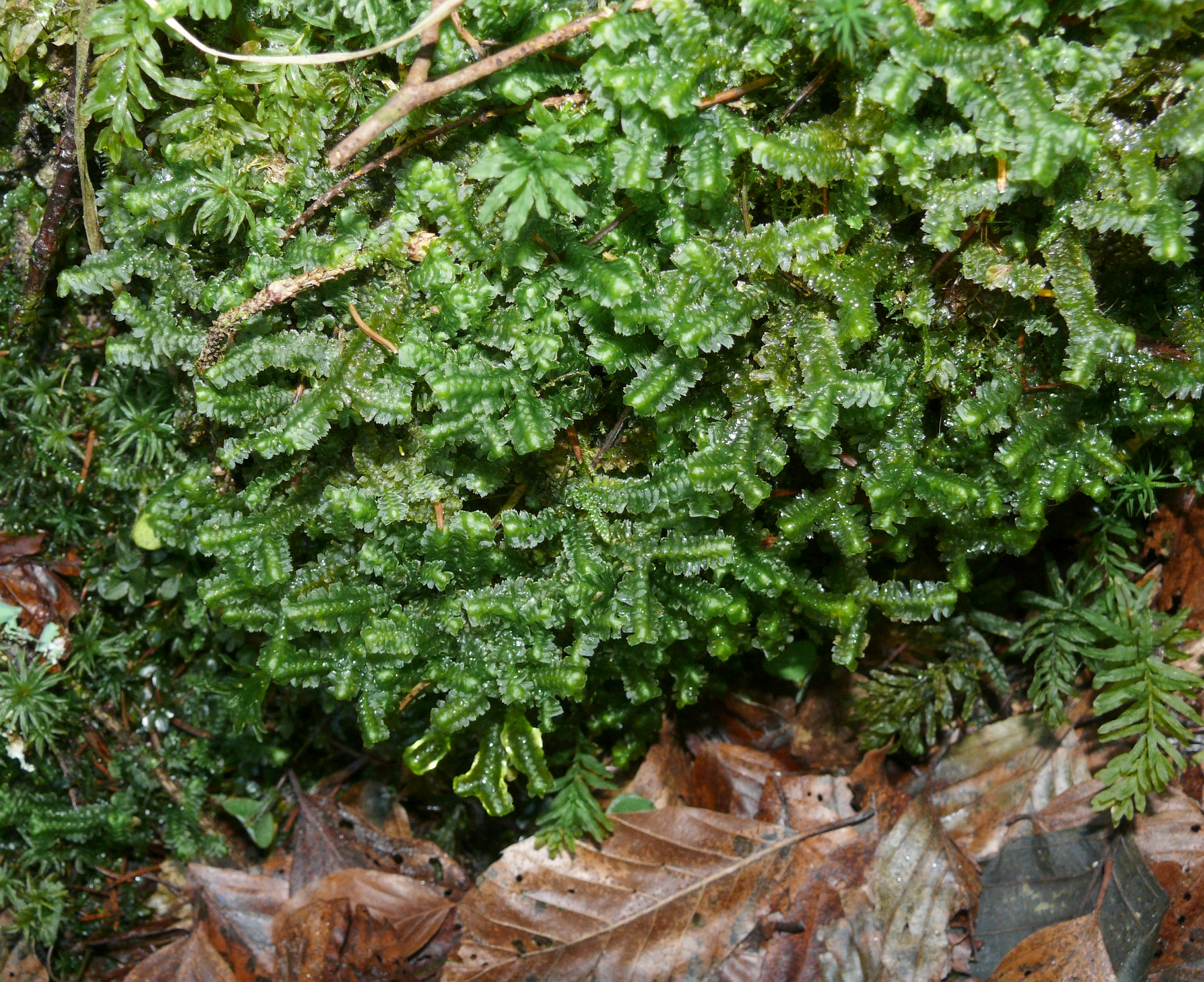 Bazzania trilobata, Schwäbisch-Fränkische Waldberge, Germany